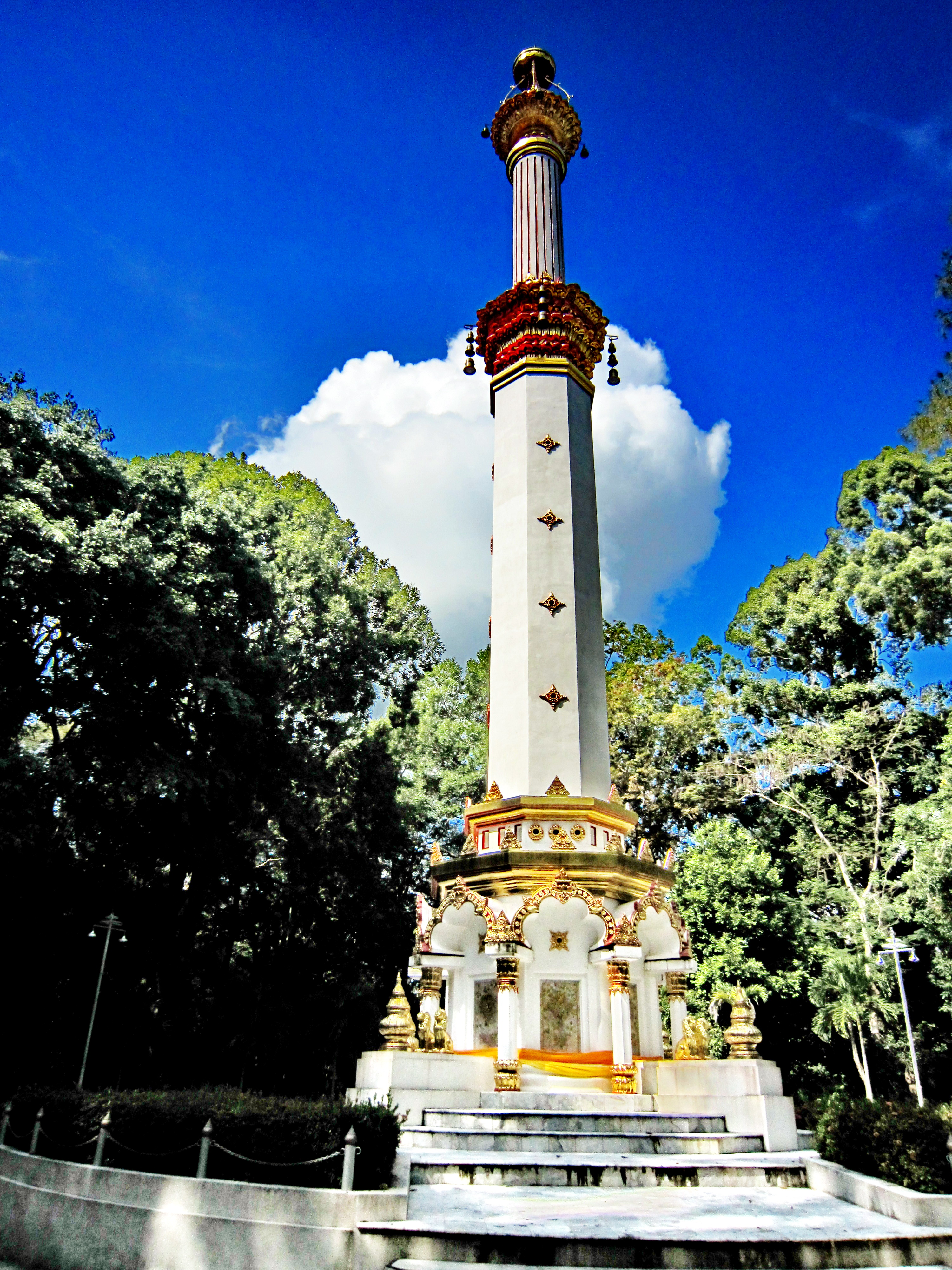 พระธาตุศรีสุราษฎร์ : Phra That Srisurat